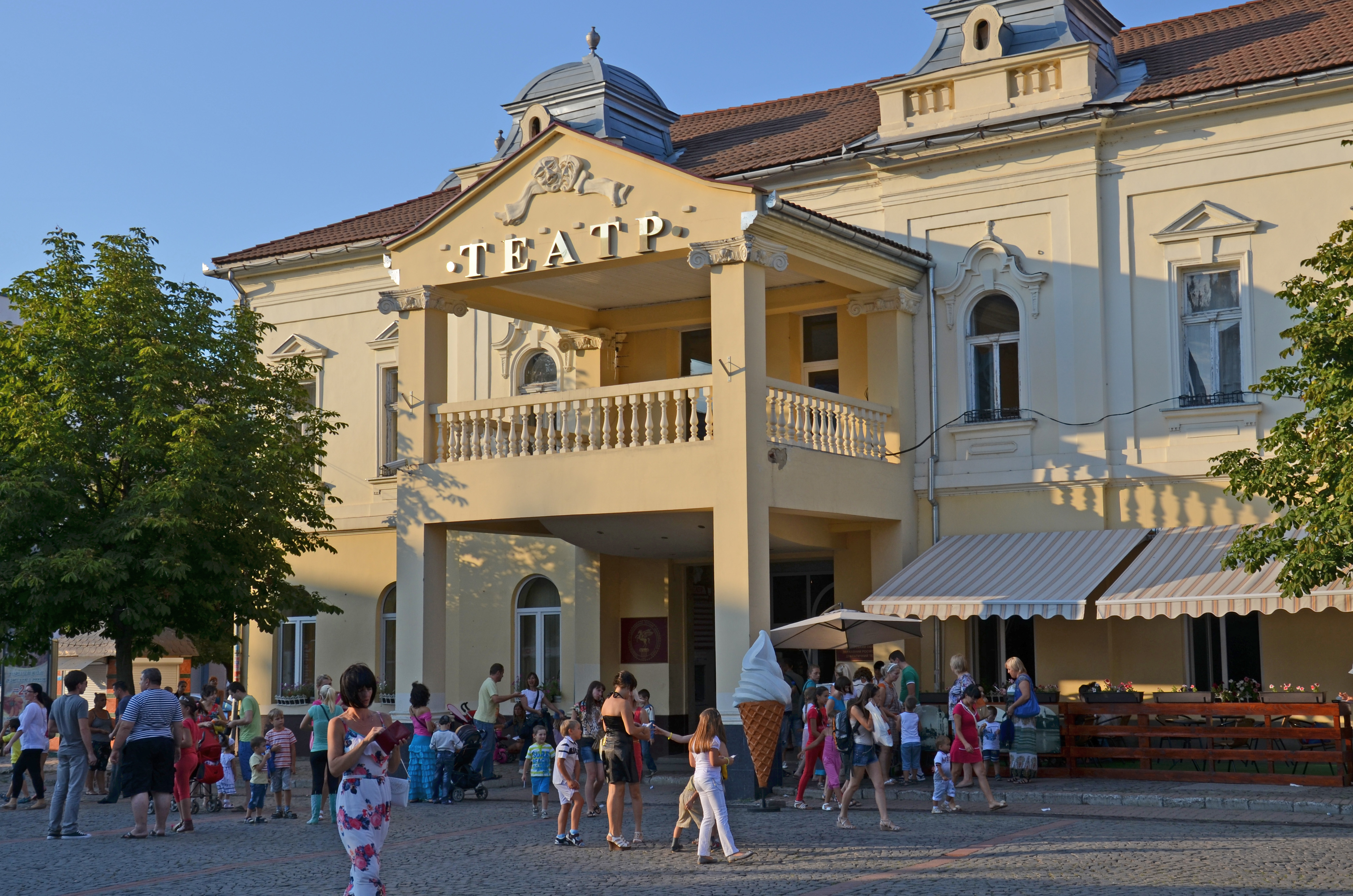 Будинок Мукачівського російського драматичного театру по вул. Грушевського, 2/1 (мур.), Мукачеве, вул. Грушевського, 2/1